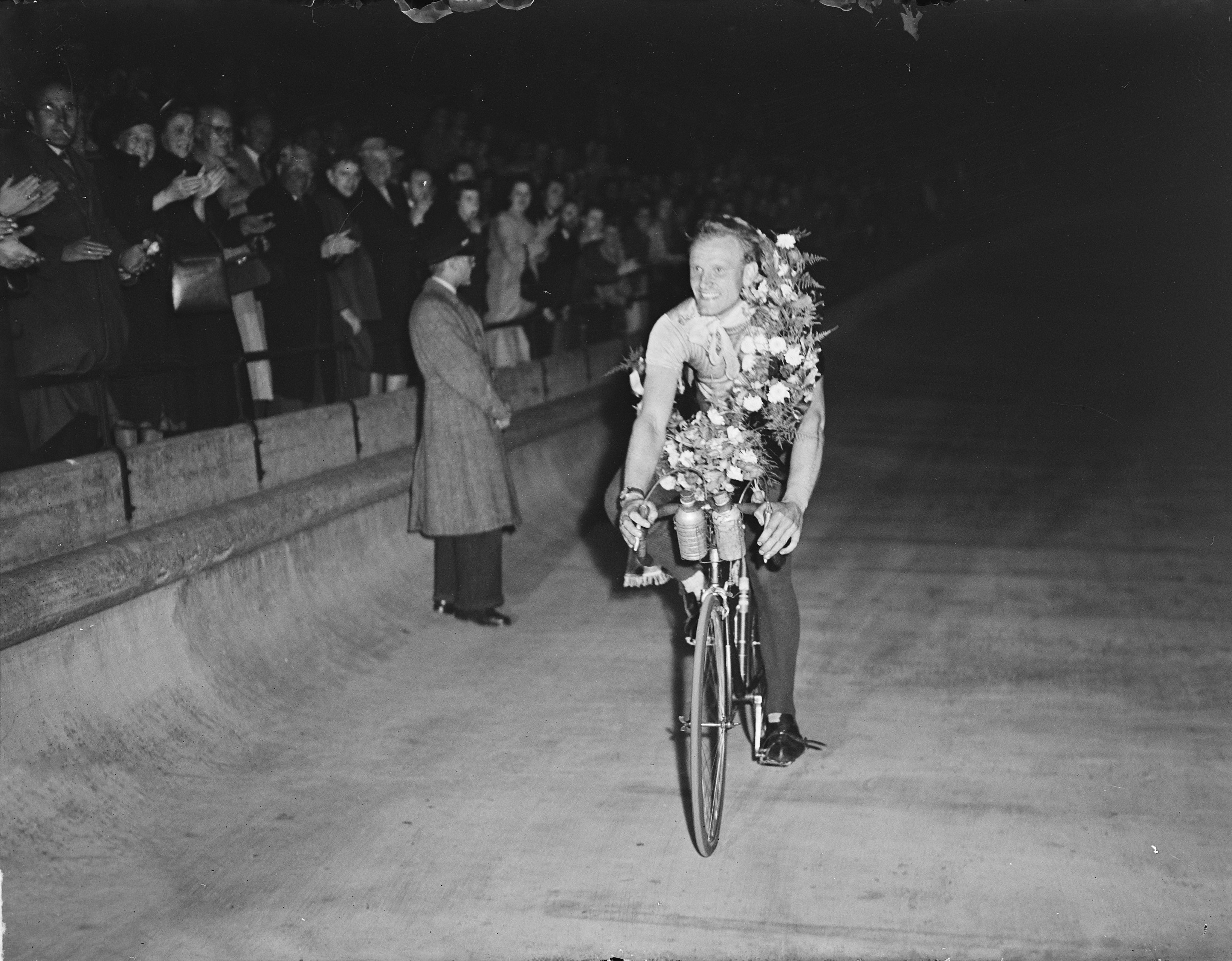 Collectie / Archief : Fotocollectie Anefo Reportage / Serie : [ onbekend ] Beschrijving : Ronde van Nederland , winnaar Henk Lakeman met krans Datum : 31 mei 1950 Trefwoorden : wielrennen Persoonsnaam : Lakeman, Henk Fotograaf : Noske, J.D. / Anefo Auteursrechthebbende : Nationaal Archief Materiaalsoort : Glasnegatief Nummer archiefinventaris : bekijk toegang 2.24.01.09 Bestanddeelnummer : 903-9968 Reacties Geplaatst door sportvrouw op 09 mei 2015 - 14:33. Plaats: Amsterdam, Noord-Holland